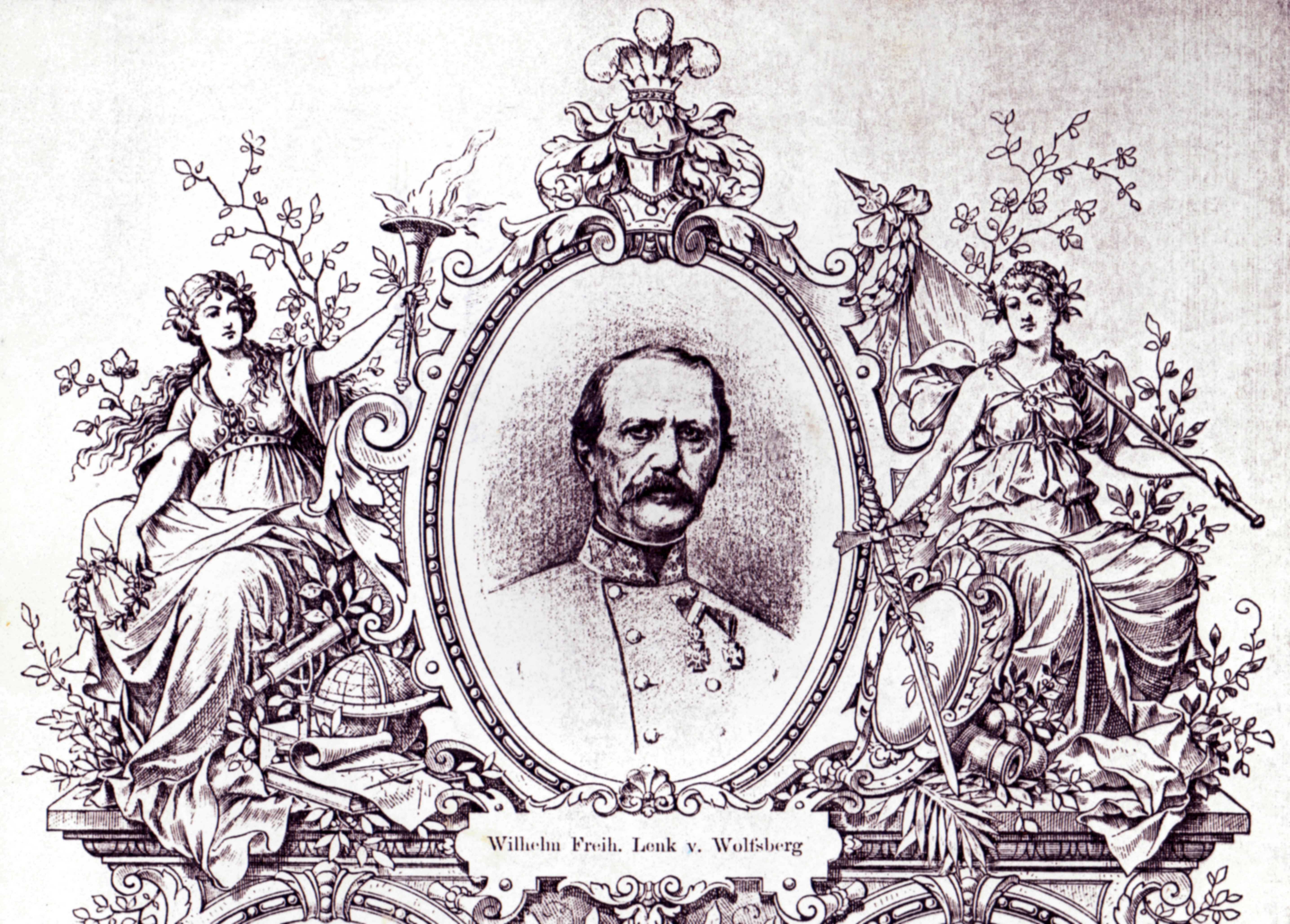 Ein Stich von 1877 oder 1878, auf dem FZM Nikolaus Wilhelm Freiherr Lenk von Wolfsberg abgebildet ist.